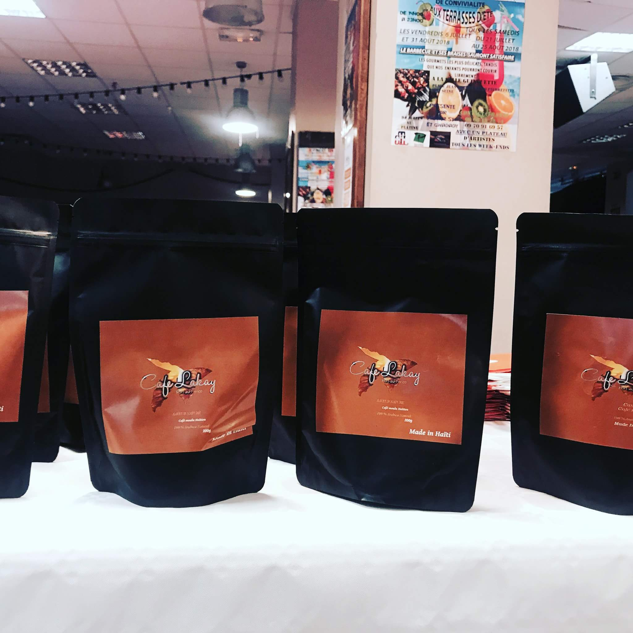 Café lakay, est une institution Haïtiènne crée par Sandra Sinvry qu'est une Haïtienne dans le but de crée l'emploi en Haïti et de mettre en valeur l'agriculture haïtienne.